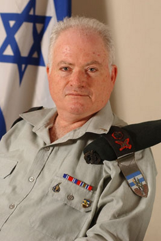 תא"ל עמוס גלעד דובר צה"ל 1995